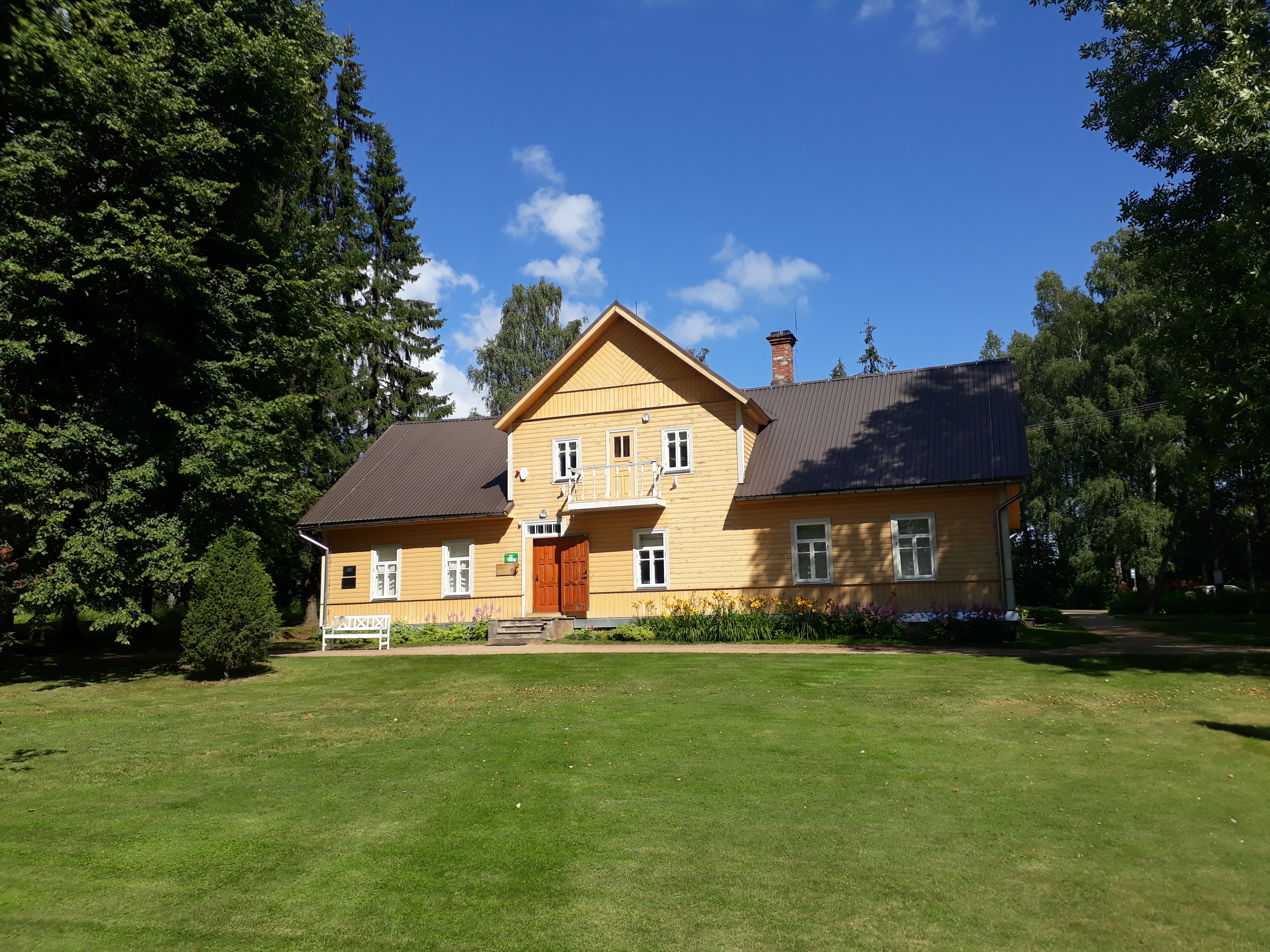 Saatse Seto Muuseumi hoone vaade, Samarina